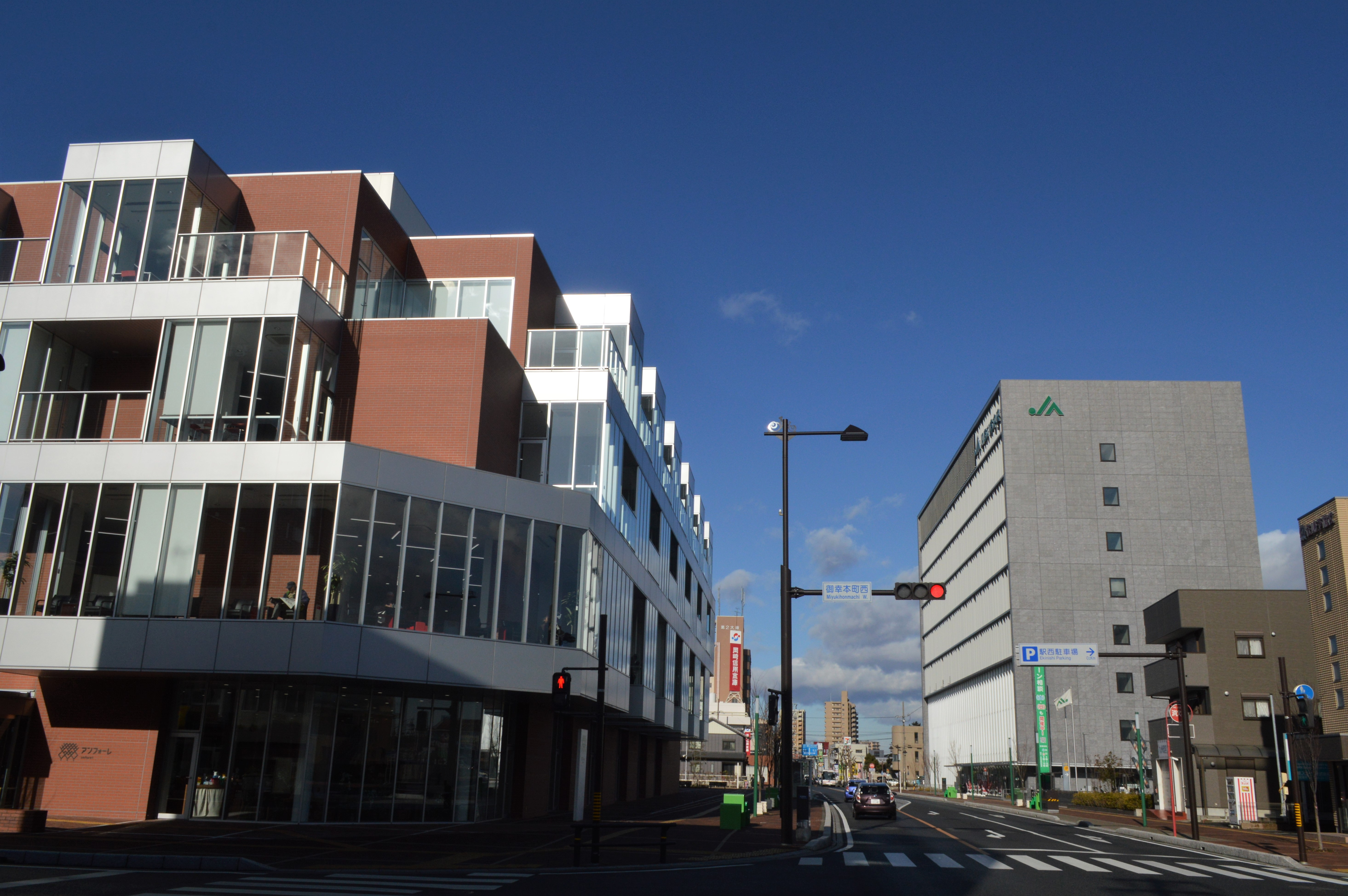 愛知県安城市のアンフォーレ本館。安城市図書情報館などが入っている。右はあいち中央農業協同組合（JAあいち中央）本店。